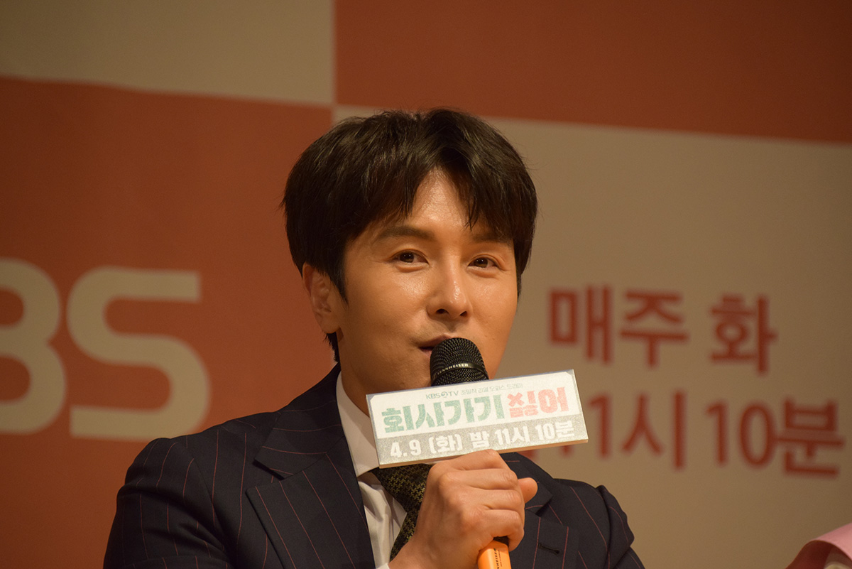 김동완 KBS 2TV 오피스드라마 '회사가기싫어' 제작발표회 (2019.4.8)